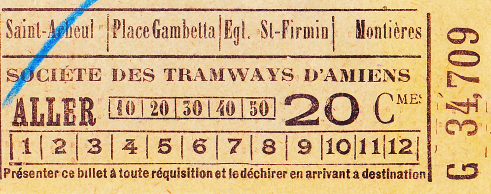 Billet en papier fin de l'ancien tramway d'Amiens